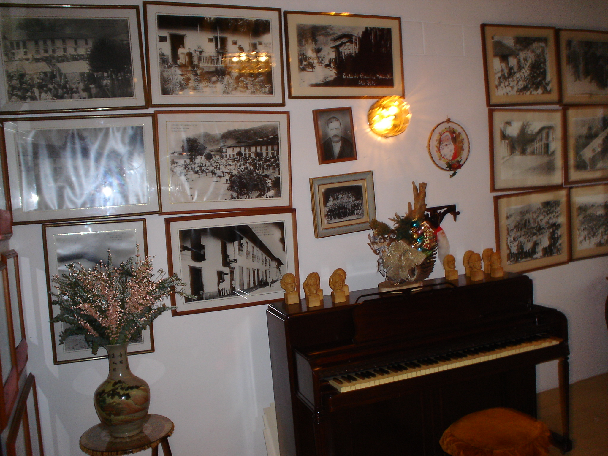 Sala 1 de Fotografía Antigua Museo Eliseo Bolívar